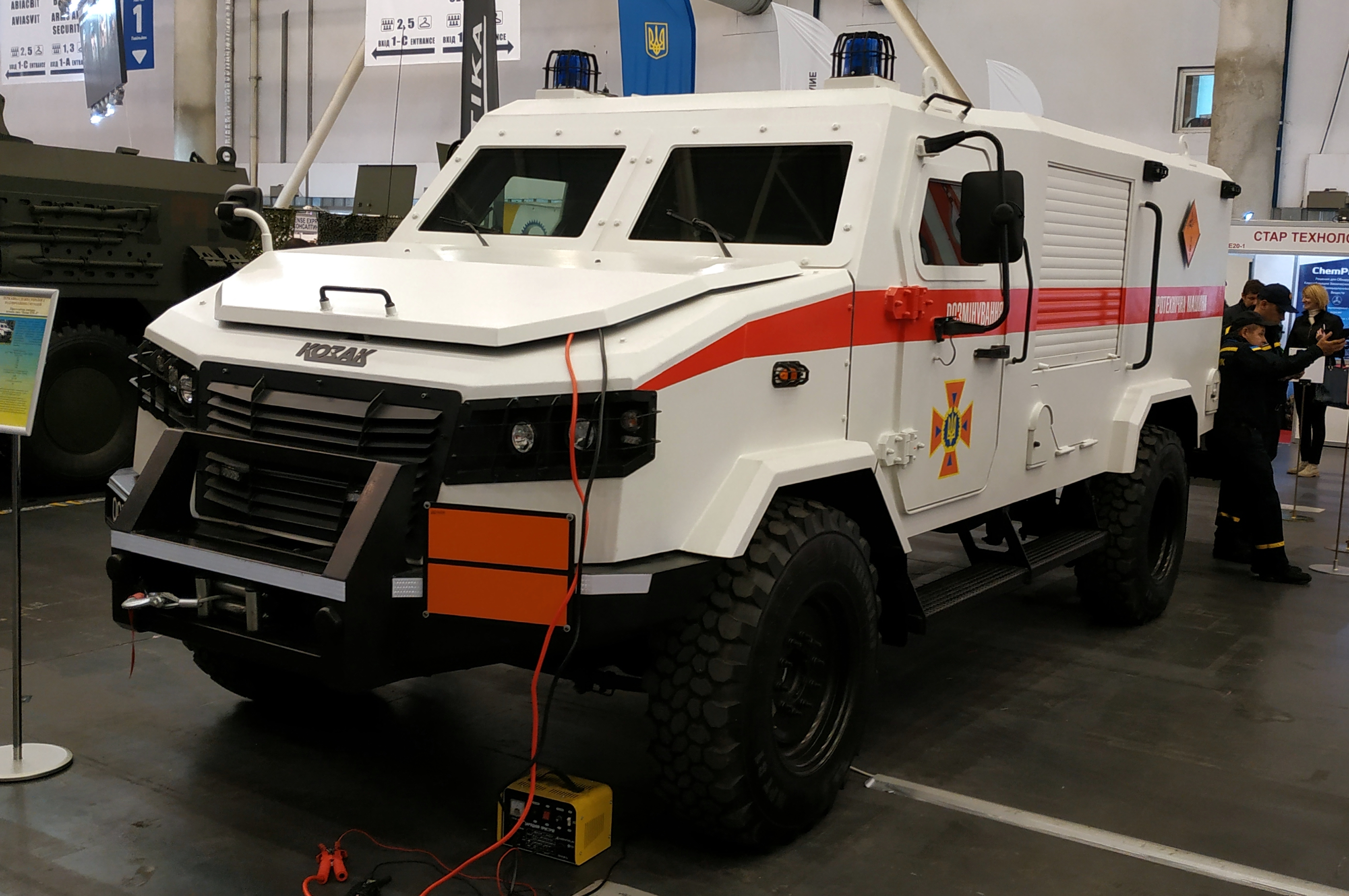 Пиротехническая машина легкого типа Козак-5ПМЛ в экспозиции Государственной службы Украины по чрезвычайным ситуациям. Выставка "Зброя та безпека", Киев, октябрь 2018 г.